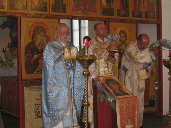 Богослужение в домовом храме "Христианской России" в Сериате